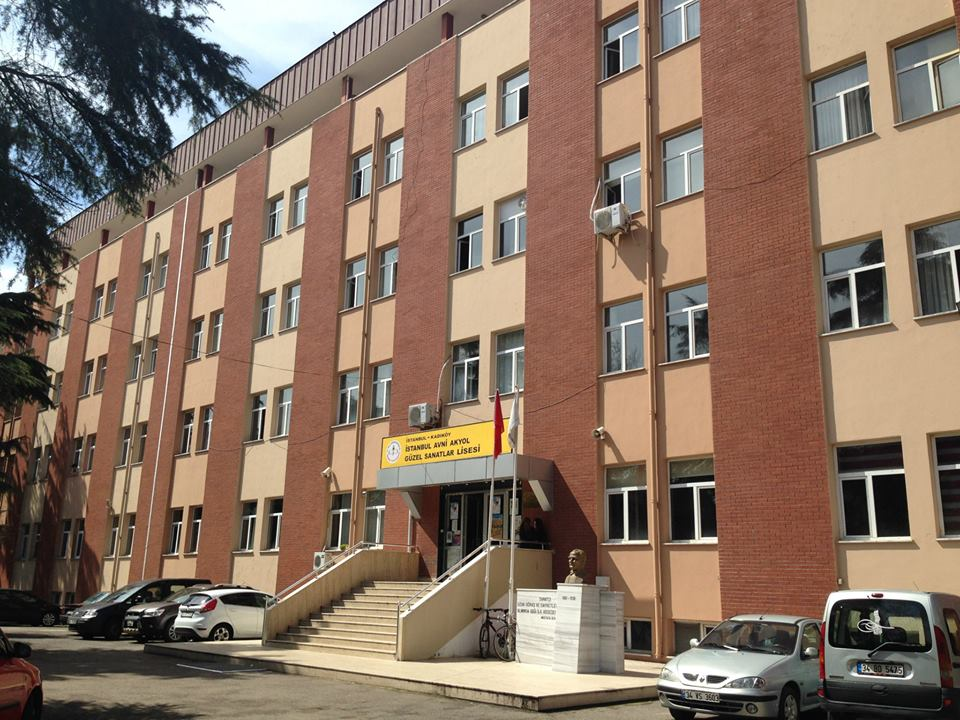 Okulun Binası